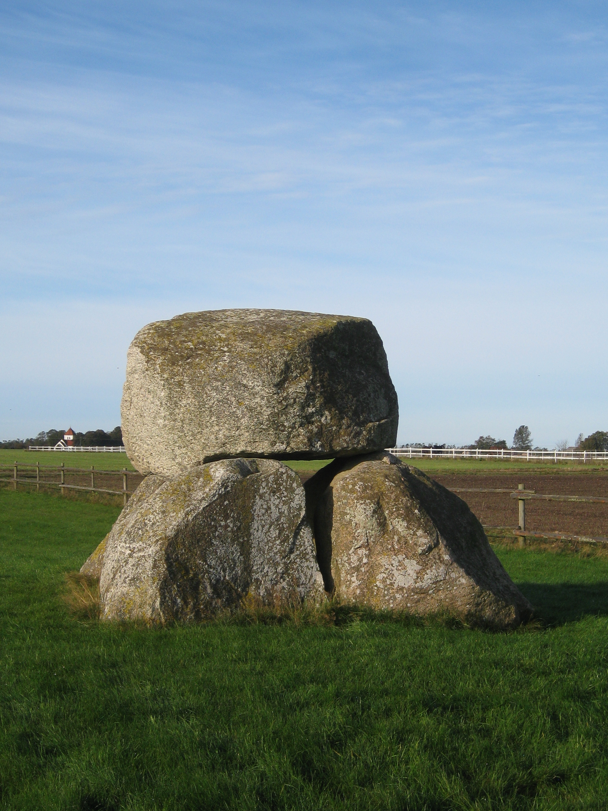 Hofterupsdösen, megalitgrav i Kävlinge kommun